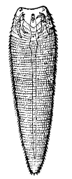 Pentastomum (Linguatula) tæioides